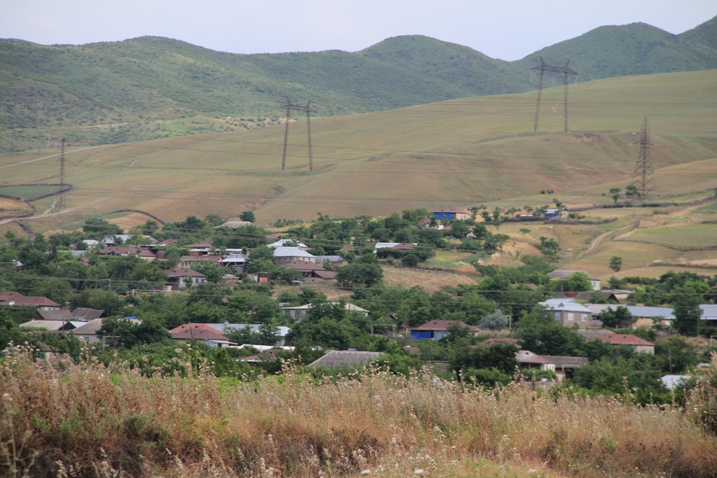 Foto Anar Həbibovundur.